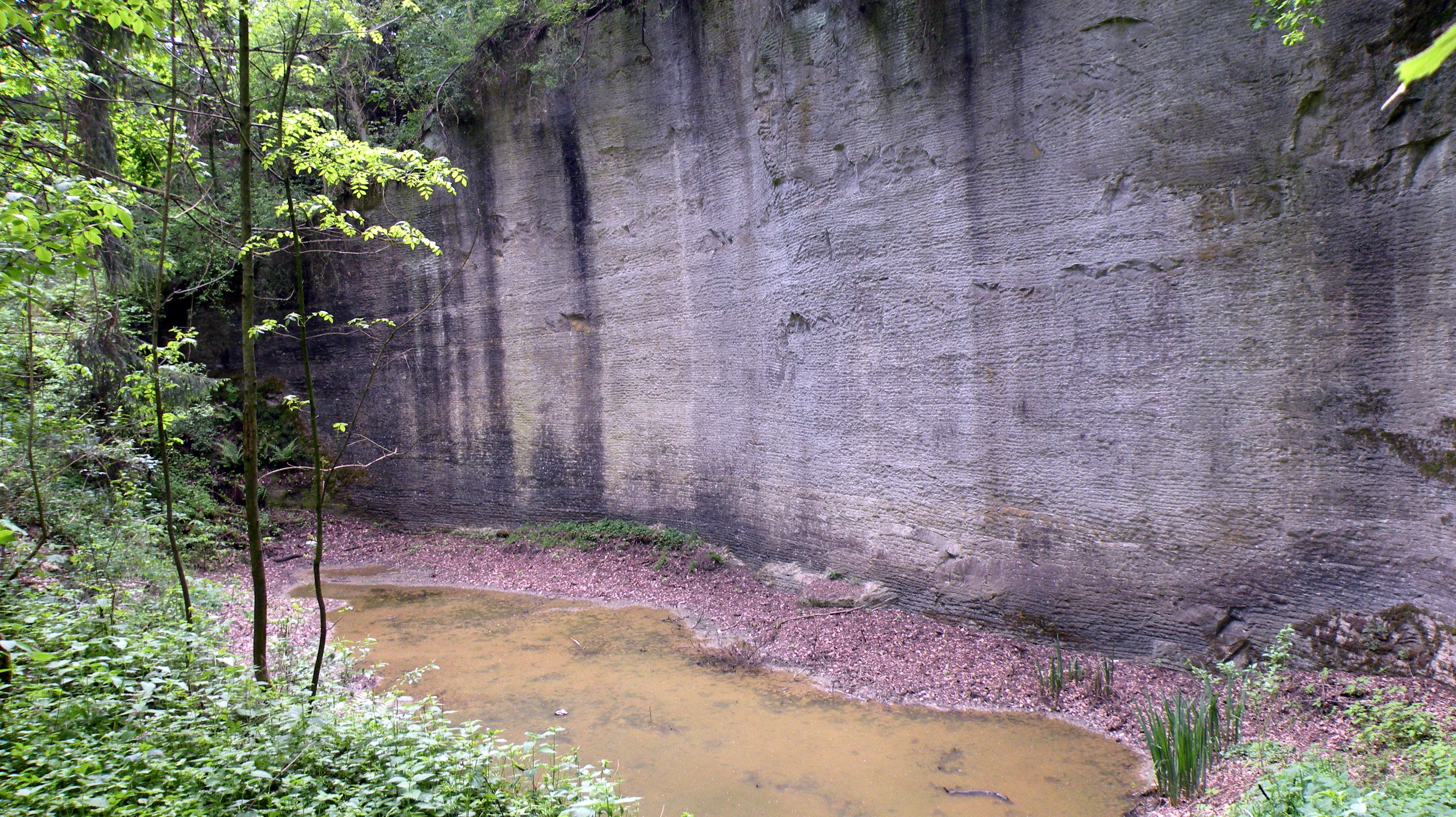 aufgelassener Steinbruch in Lanzenberg